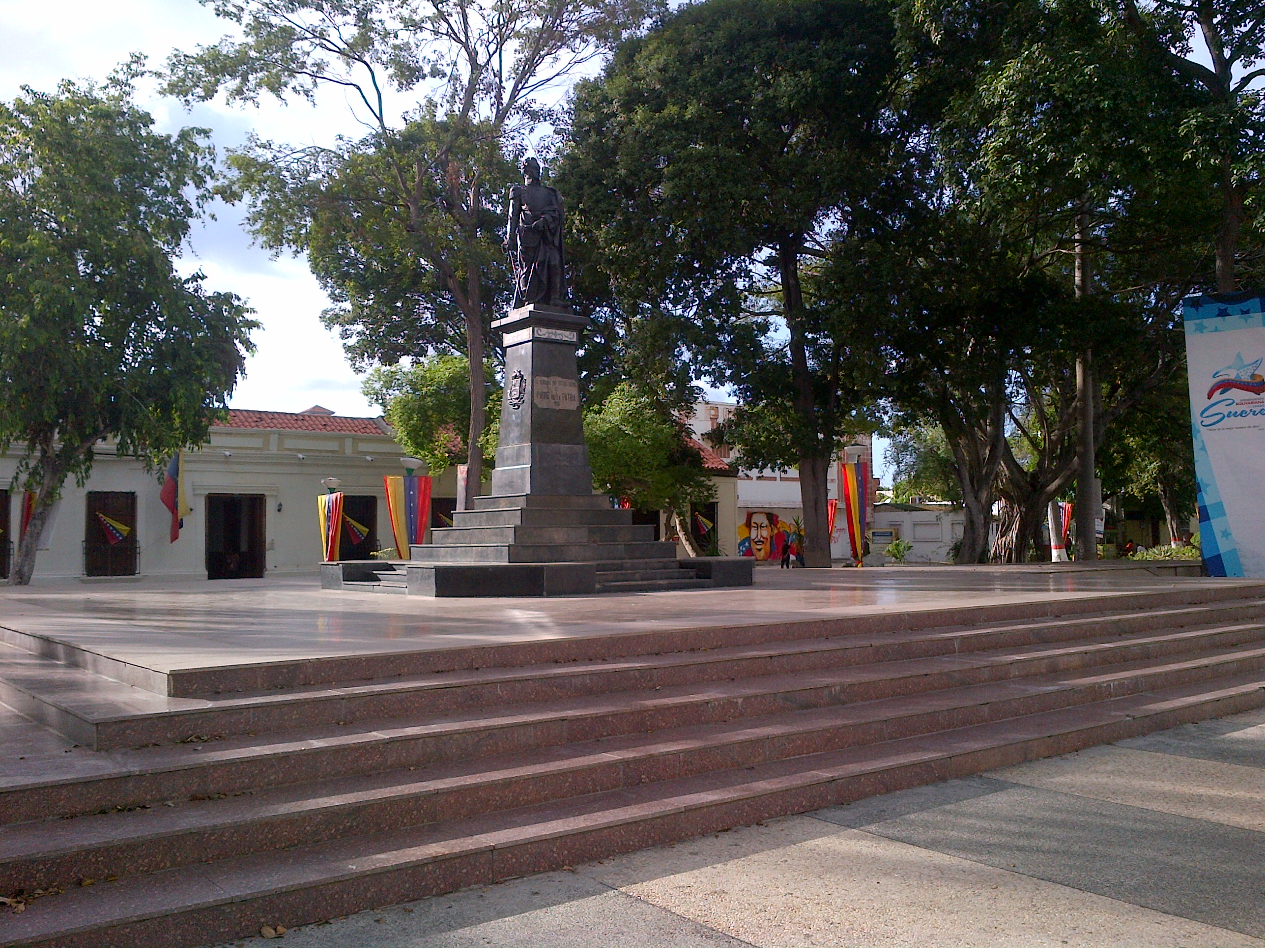 Vista parcial de la Plaza Bolívar de Cumaná